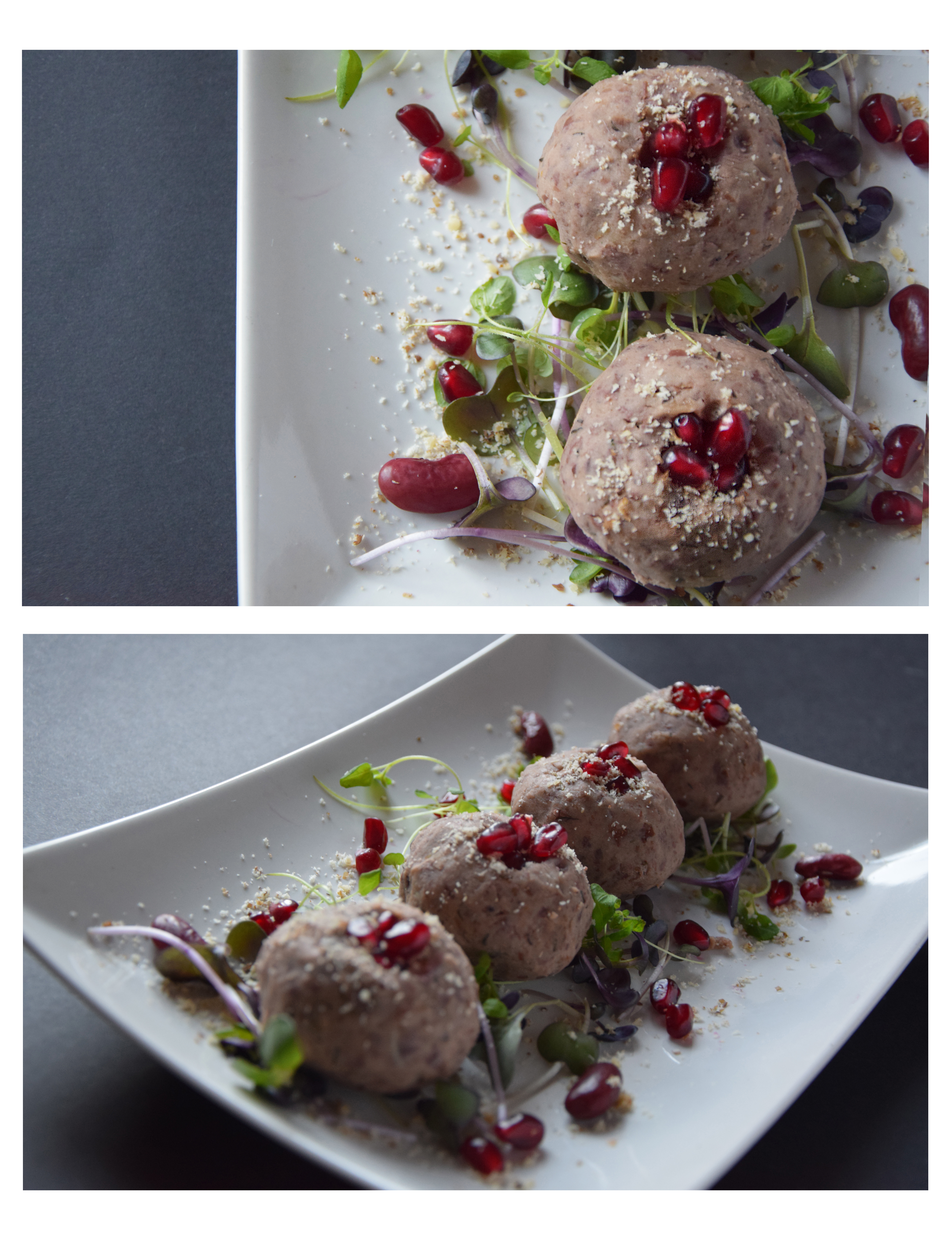 pasta lobio w formie kulek z owocem granatu i liścmi kolendry